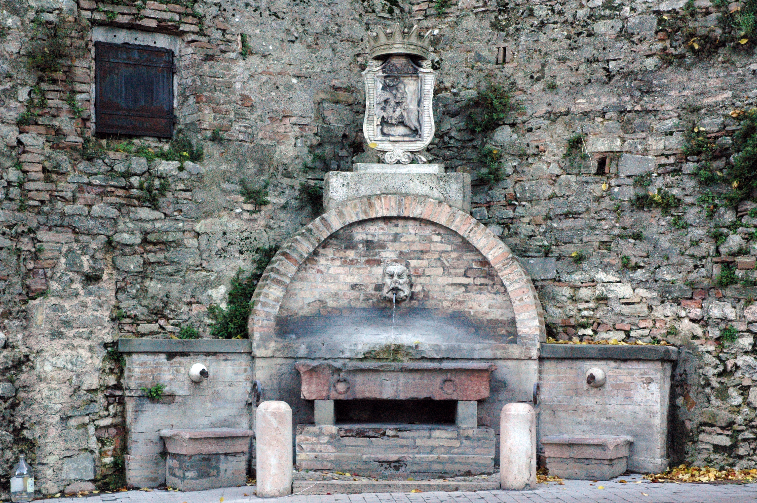 Fontana di San Giuseppe Il palazzo all'interno della "Curva di Picchi" (Largo Fratti) ha forma tondeggiante perché demolito in funzione della costruzione della curva intorno al 1850. Prima della demolizione v'era, addossata al palazzo, la fontanella di S. Giuseppe. Per non privare la popolazione ivi residente della preziosa acqua, nel 1856, insieme alla costruzione della strada (la traversa nazionale interna) si pensò anche alla costruzione di questa fontanella, sul lato opposto di quella demolita. È composta da tre uscite di cui quella centrale contornata da un piccolo mascherone. Reca, in alto, lo stemma della città con corona e cavaliere in battaglia